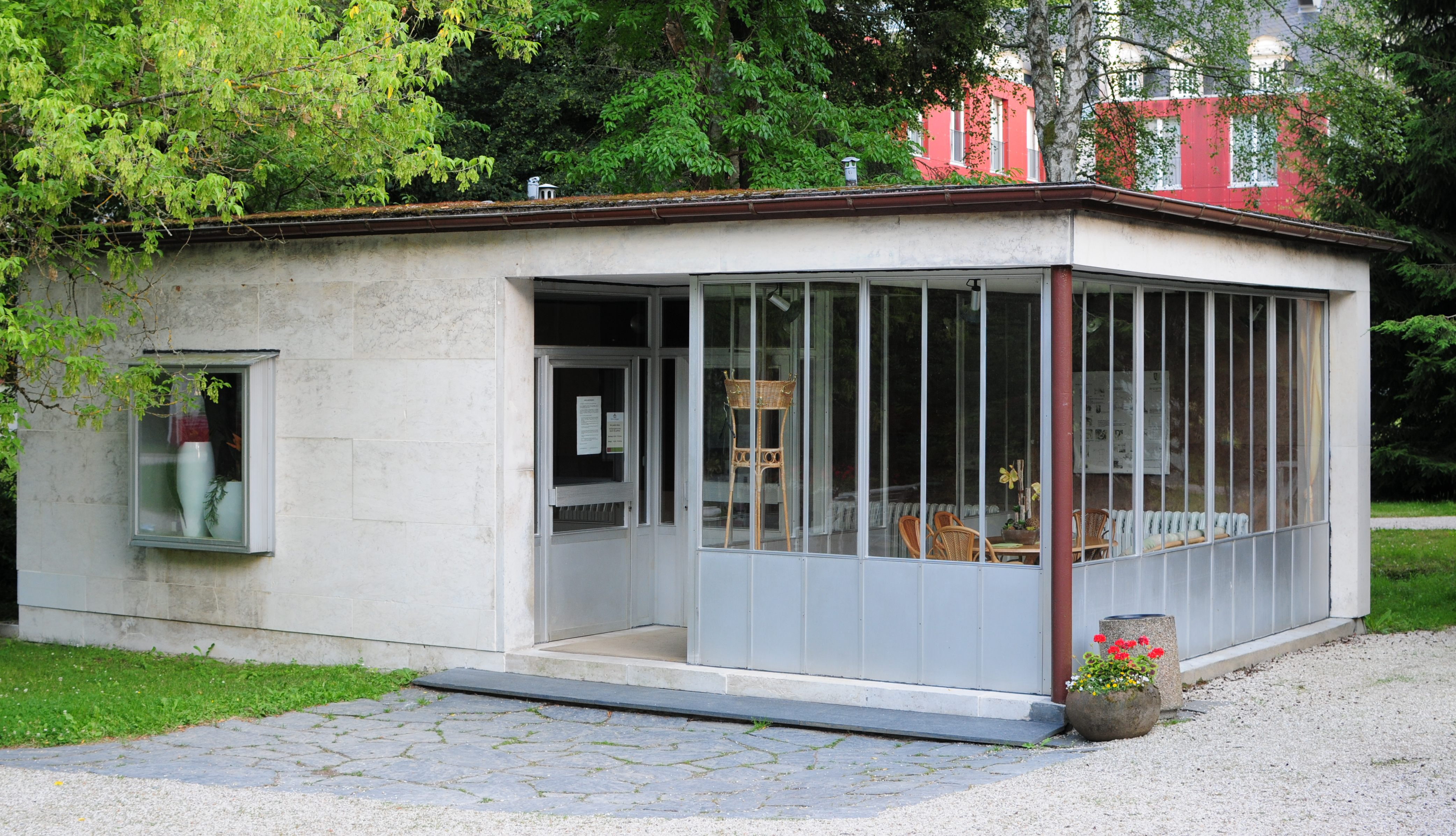 Gemeinde Bad Brambach, Kurpark Bad Brambach, Eisenquelle (Vogtlandkreis, Freistaat Sachsen, Deutschland)